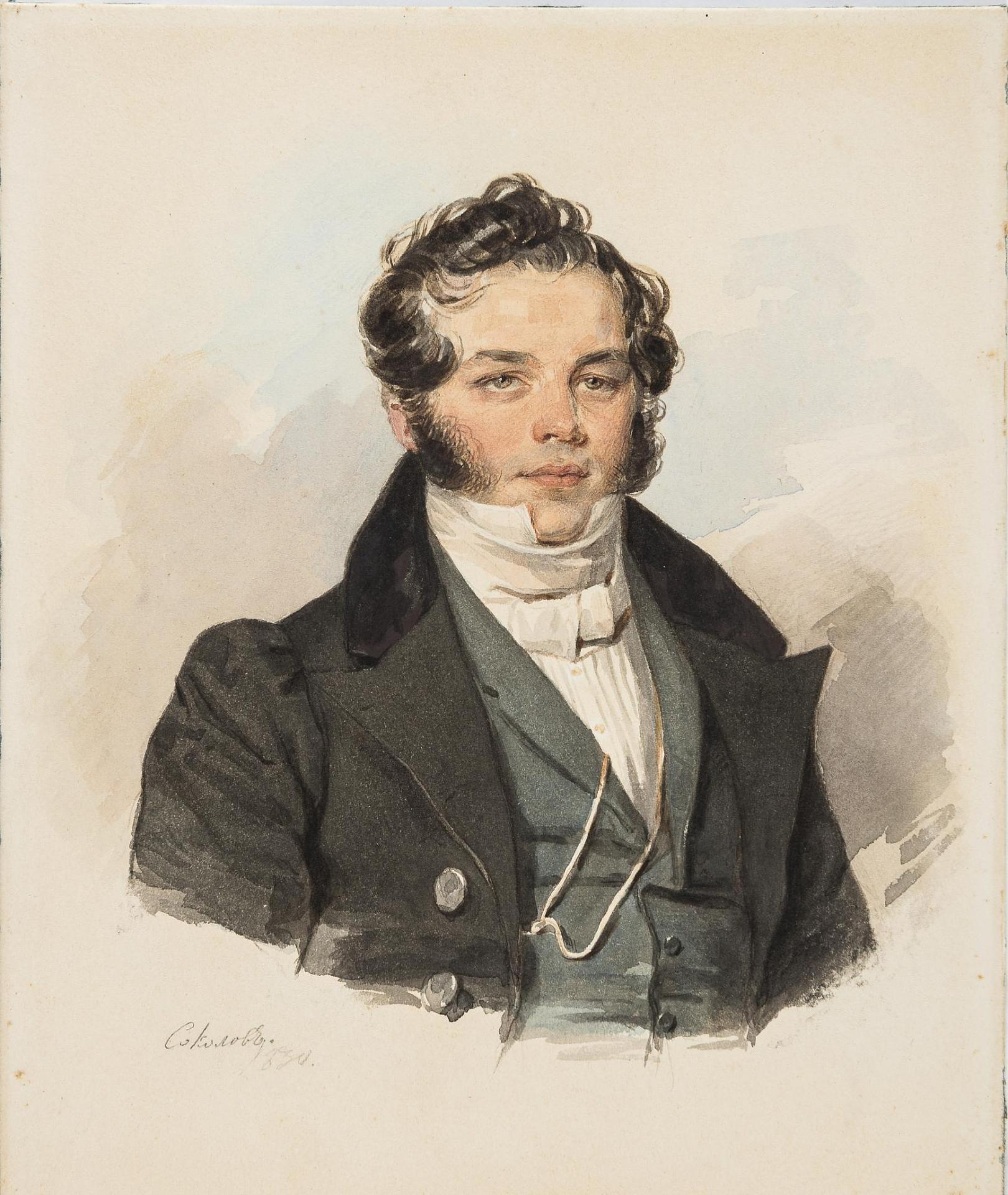 Иван Гаврилович Кругликов (1787-1847), полковник, тайный советник. Родоначальник графов Чернышевых-Кругликовых.